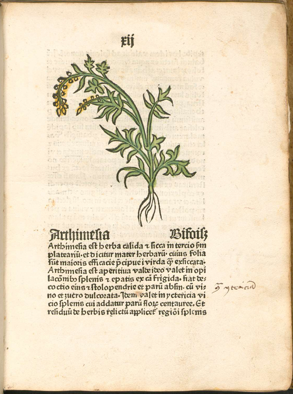 Kapitel XII, Beifuß, 1. Teil